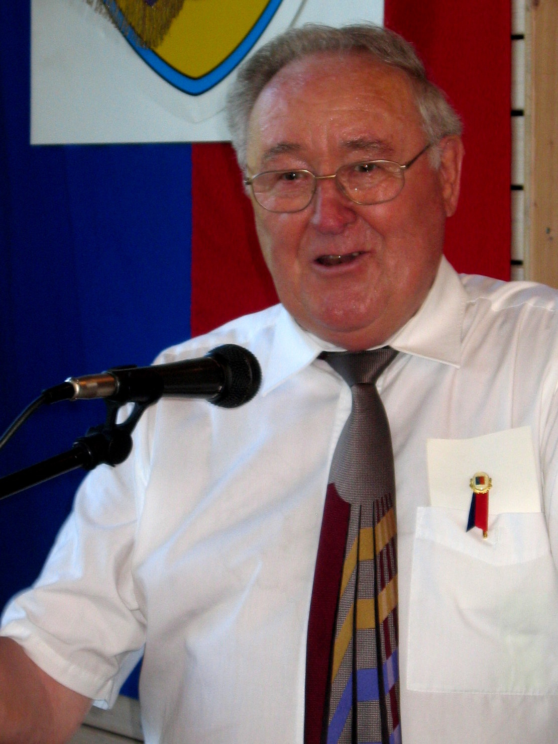 Michael Trein, Verbandsfunktionär der Landmannschaft der Siebenbürger Sachsen in Deutschland.